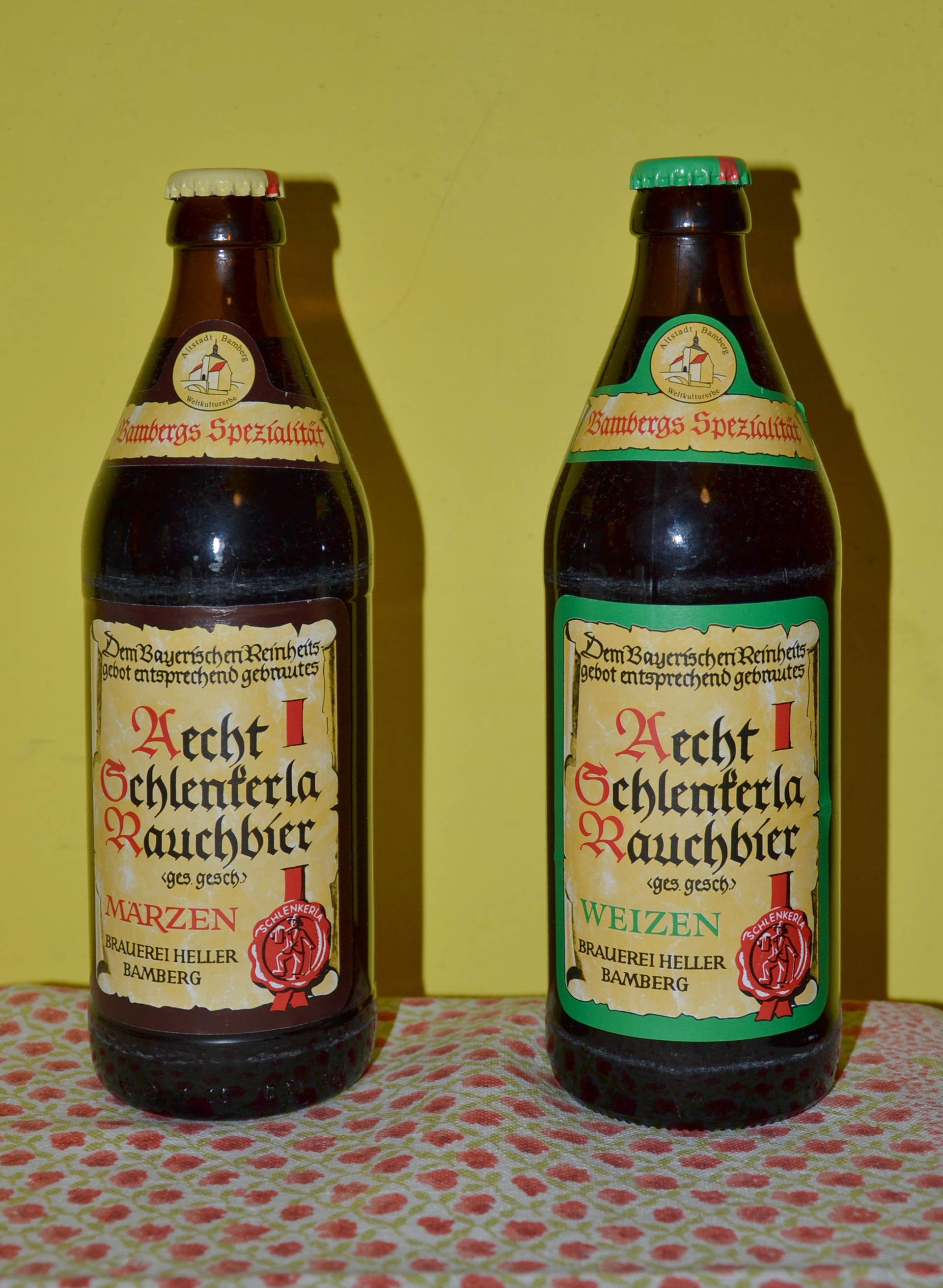 Aecht Schlenkerla Rauchbier Märzen und Weizen